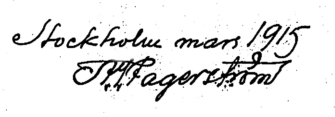 Arkitekt Victor Fagerströms signatur